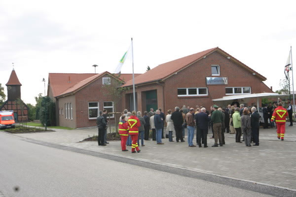 Einweihung des neuen Gemeindehauses am 30.9.05